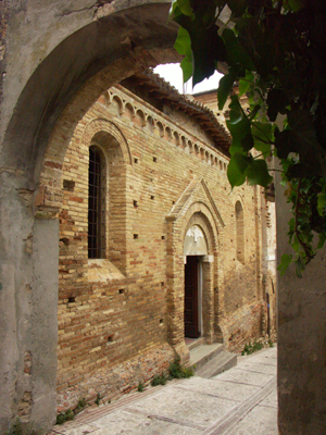 Santamariaincastello3.jpg